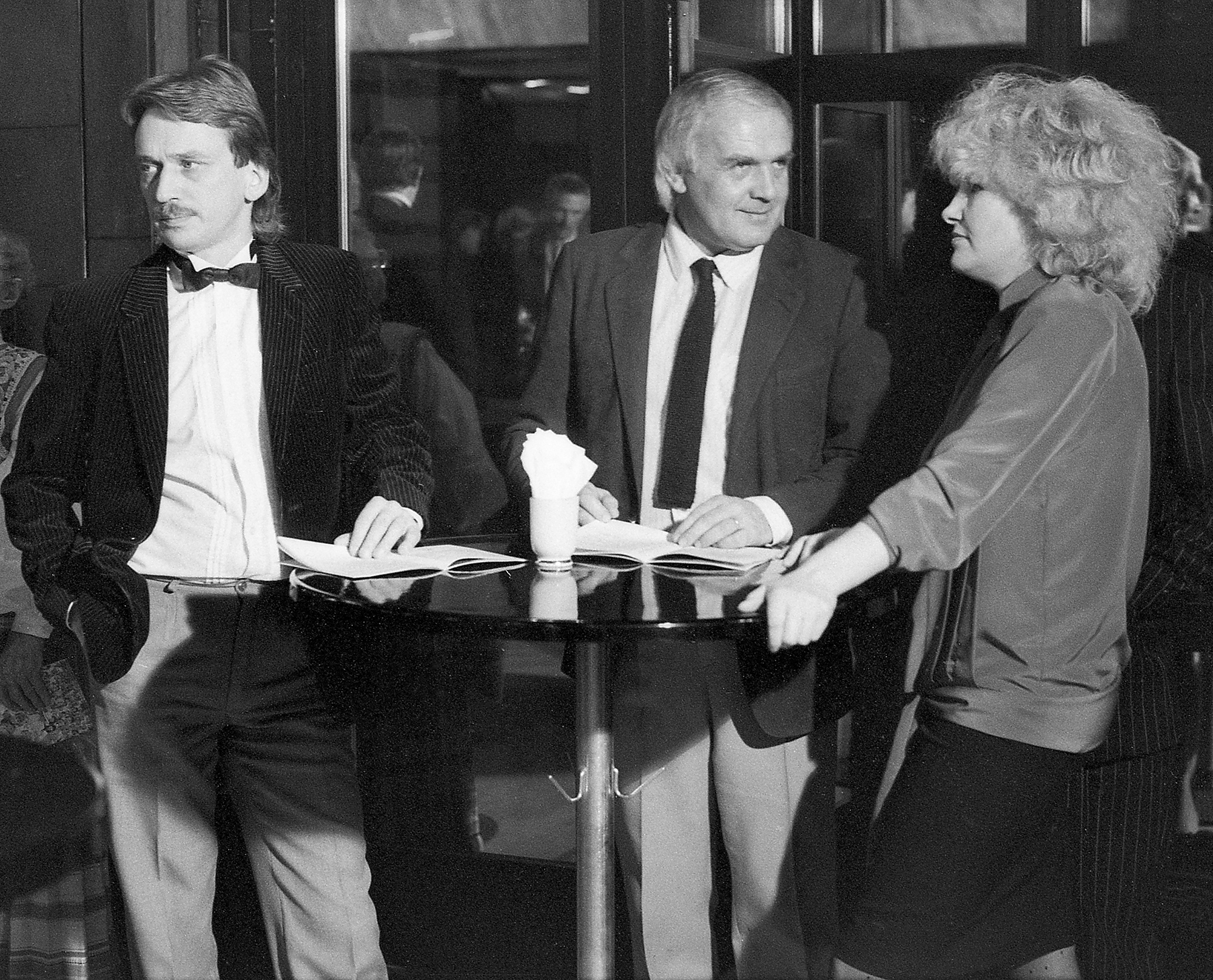 Harri Kingo, Mati ja Alice Talvik 88